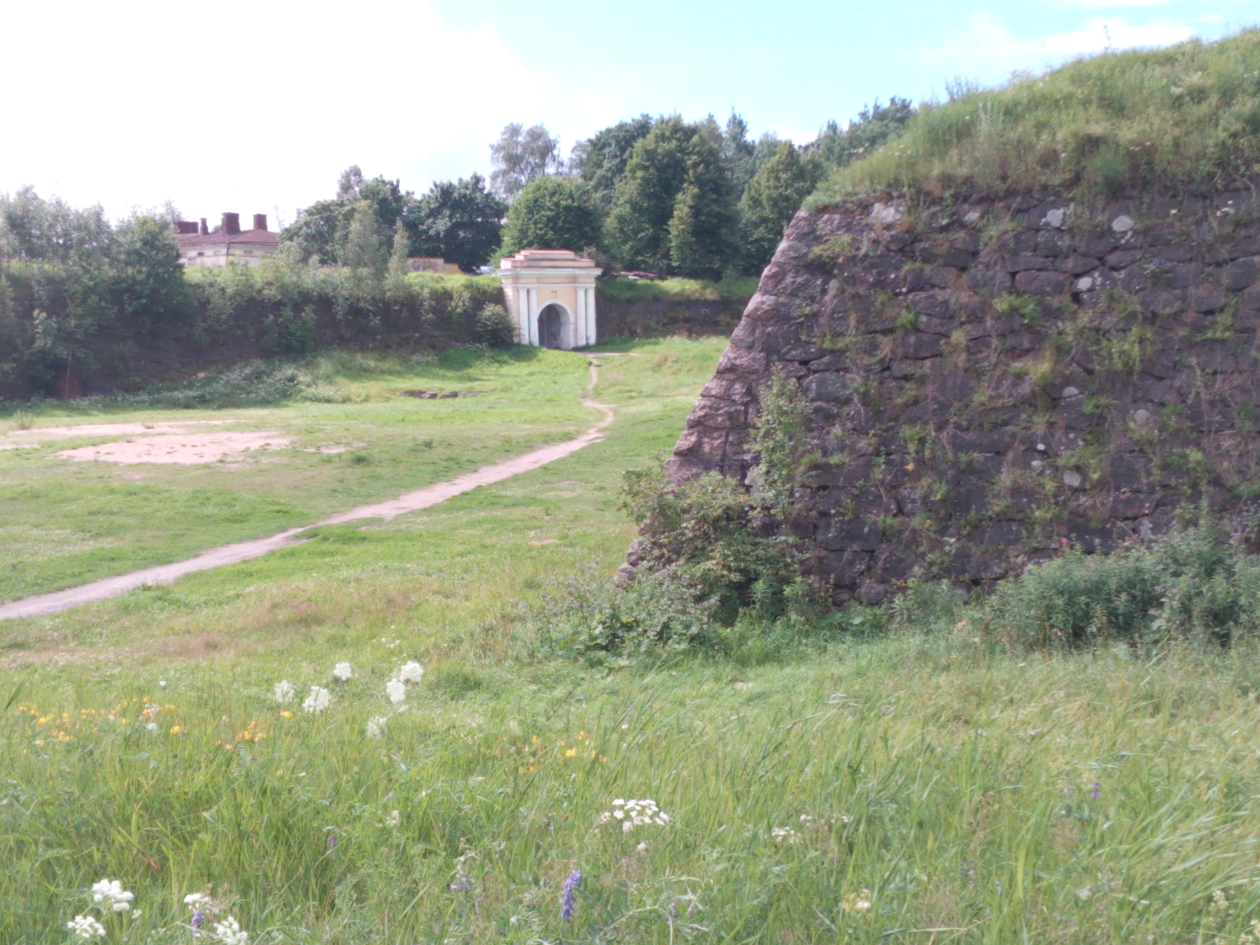 Крепость Корона Санкт-Анна (Анненкрон): улицы Островная, Батальонная, Петровская (Выборгская слобода), Выборг, Выборгский район, Ленинградская область